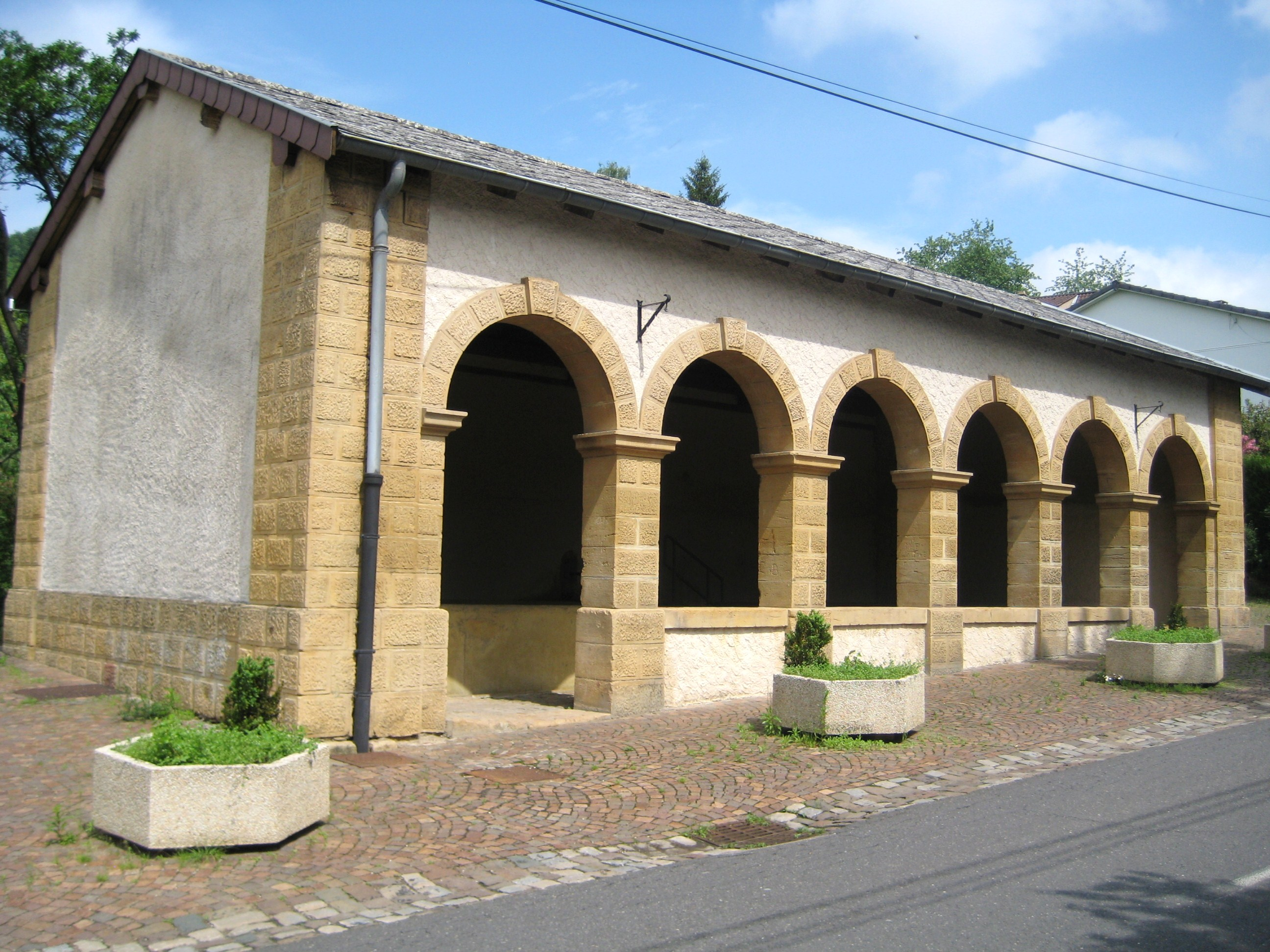 Lavoir de Marange, France